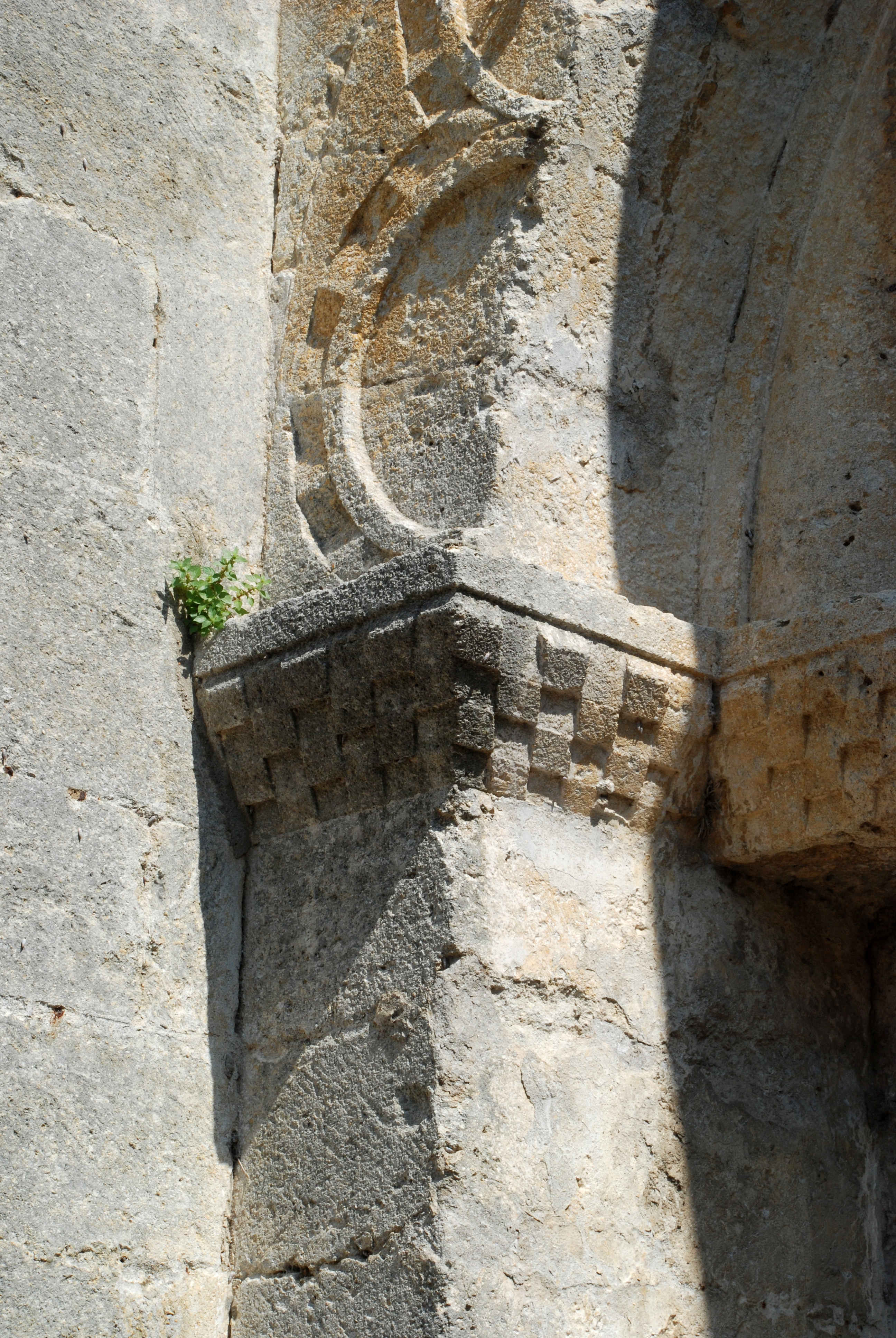 France - Provence - Boulbon - Saint-Marcellin